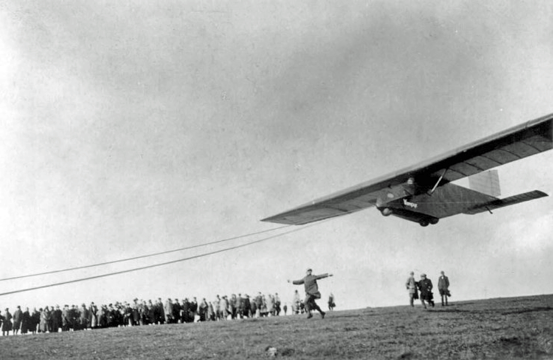 Ein Start der HAWA Vampyr 1922 in der Rhön